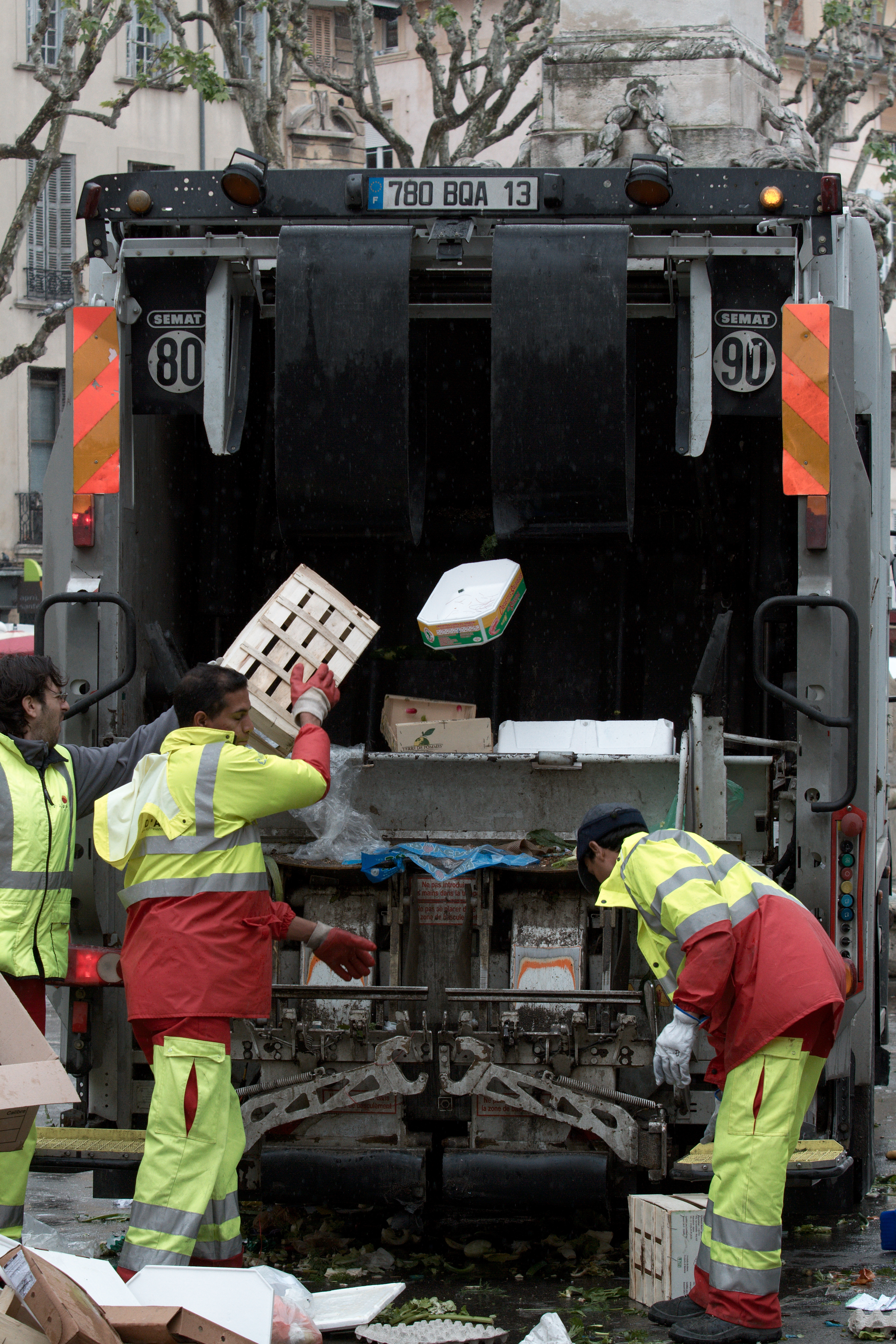 Éboueurs officiant sur la Place des Prêcheurs à Aix-en-Provence (Bouches-du-Rhône, France).